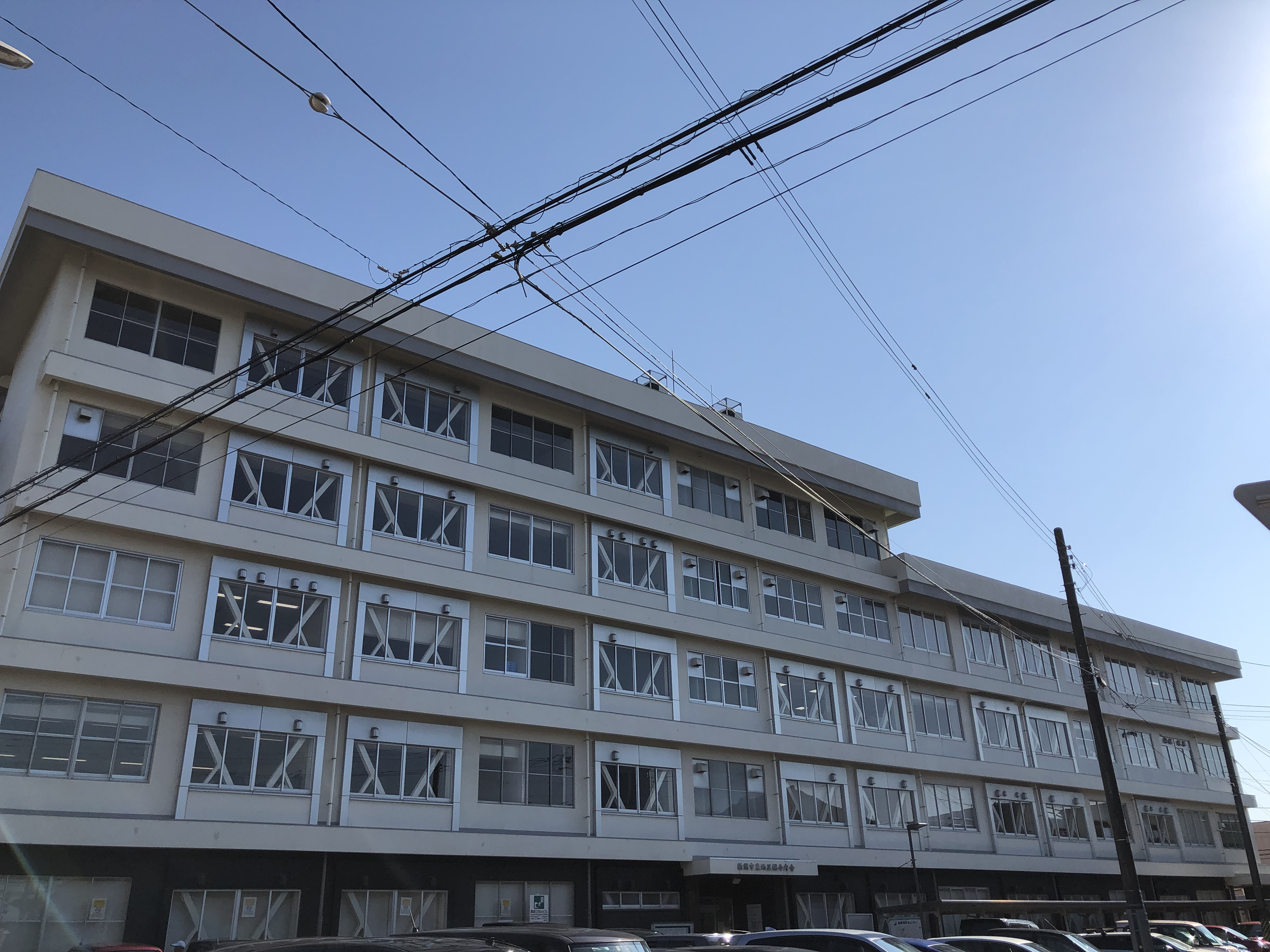 旧新潟市立沼垂図書館の写真です。今は東地区総合庁舎になっている。